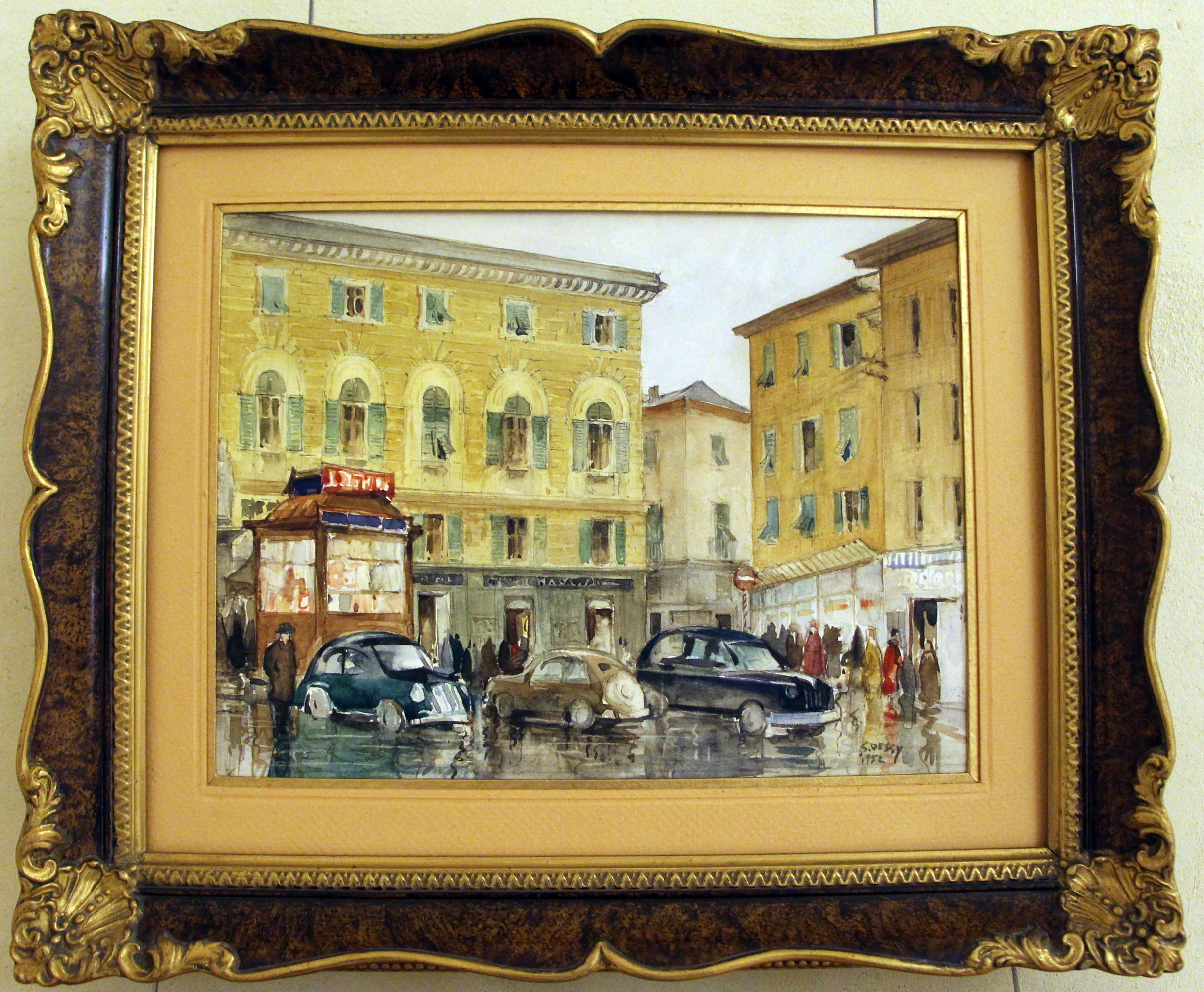 Pinacoteca Mus'a al Canopoleno - MIBAC The making of this document was supported by Wikimedia CH. (Submit your project!) For all the files concerned, please see the category Supported by Wikimedia CH. This is a photo of a monument which is part of cultural heritage of Italy.